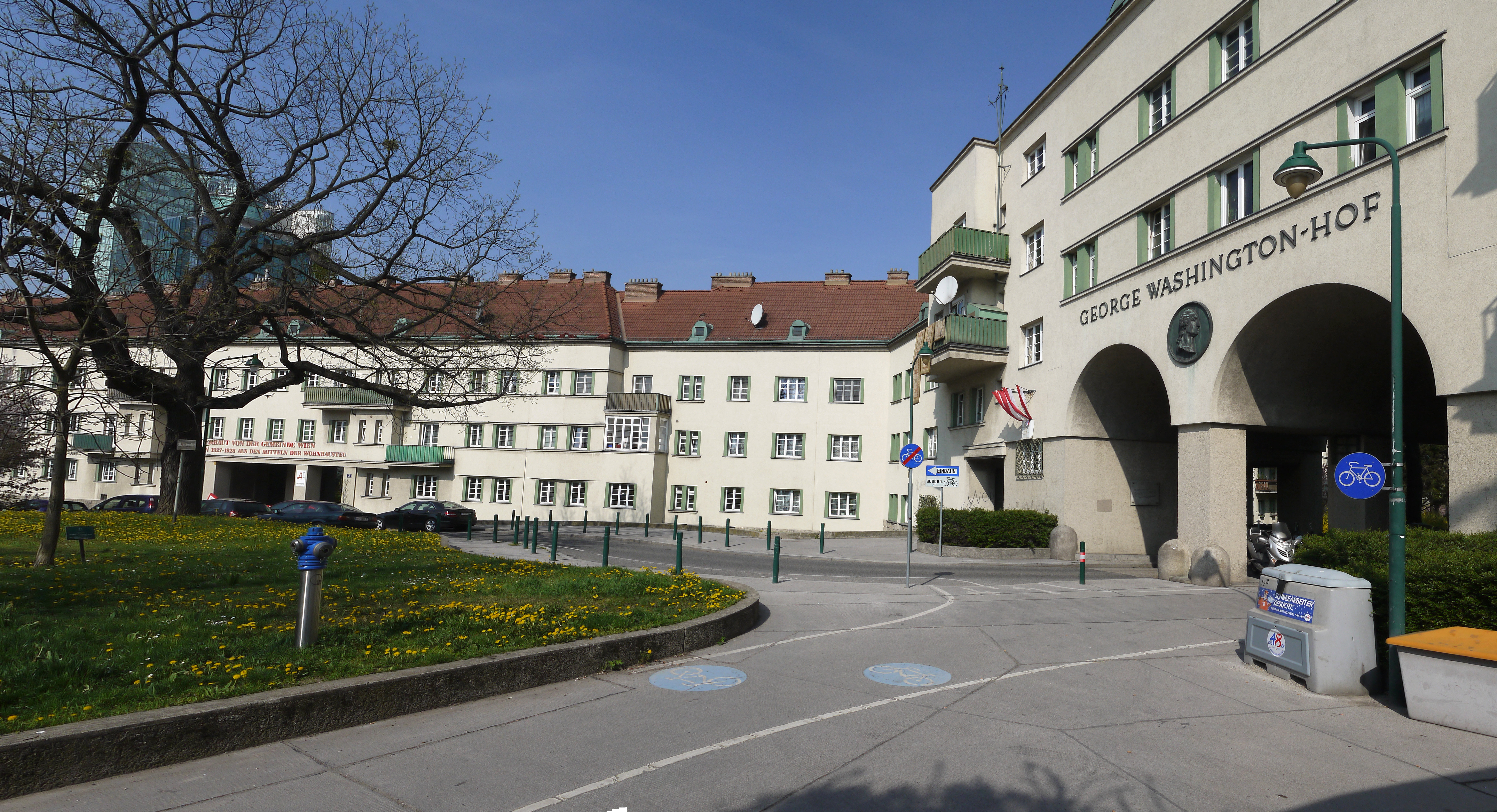 Kommunaler Wohnbau, George-Washington-Hof